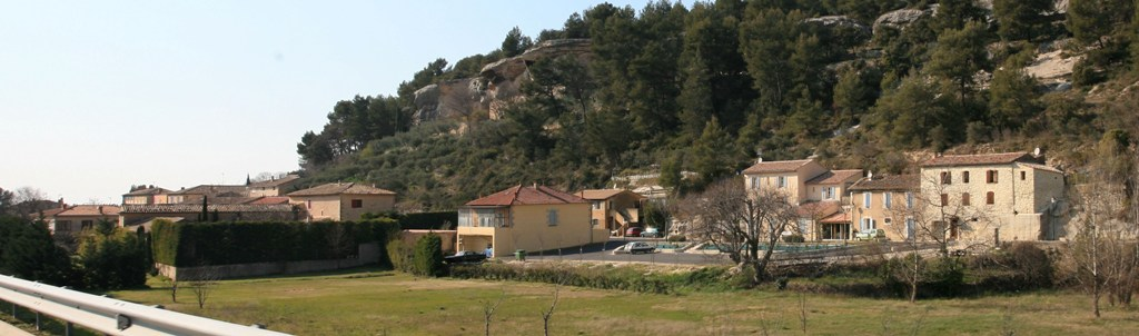 Village of les Beaumettes, Vaucluse, France